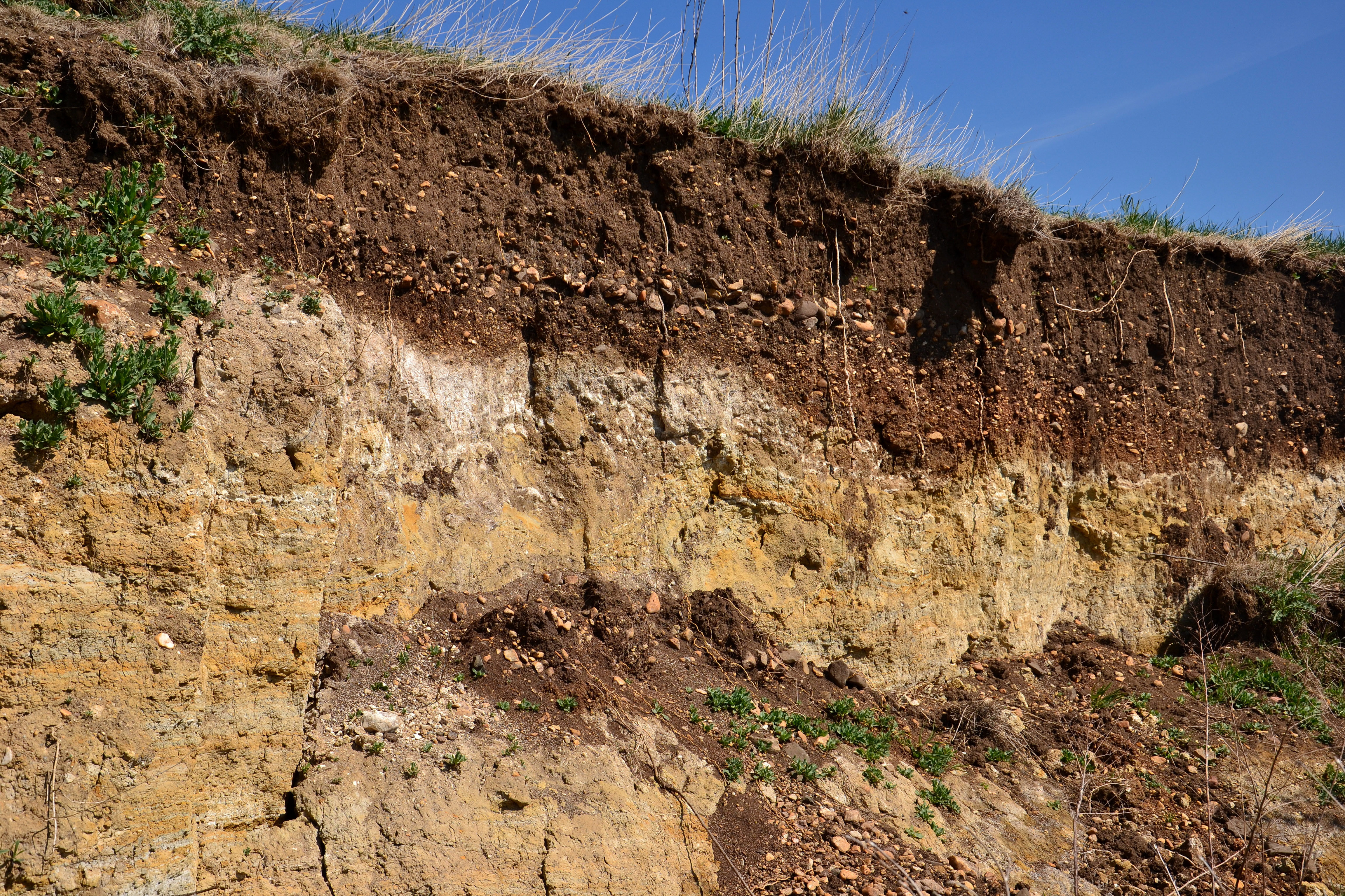 Libědice – půdní profil odkrytý sesuvem u silnice severně od vesnice